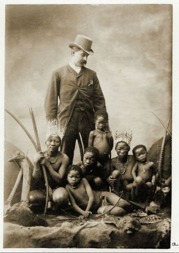 Guillermo Antonio Farini posa com pigmeus no Royal Aquarium de Londres